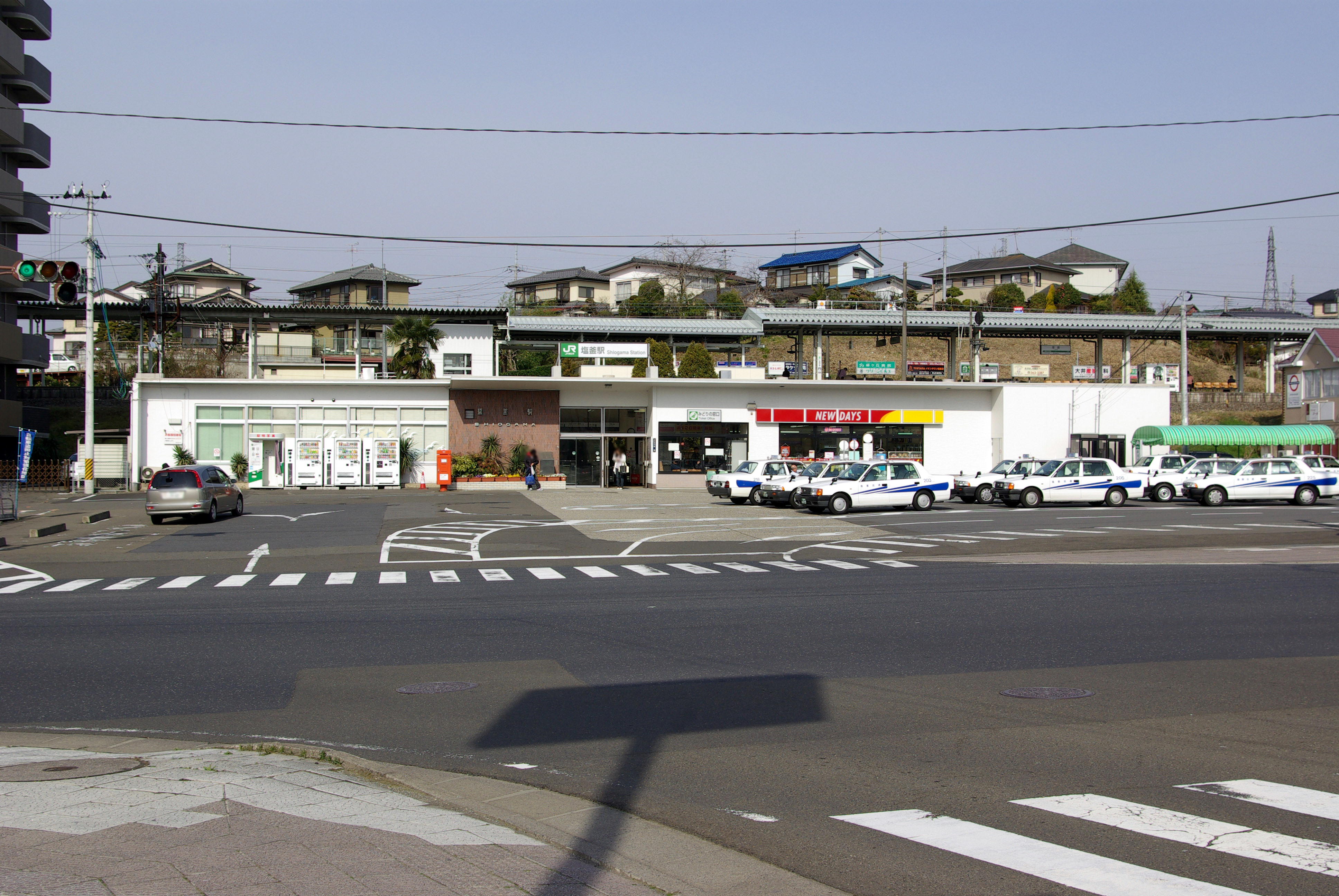 JR東北本線塩釜駅